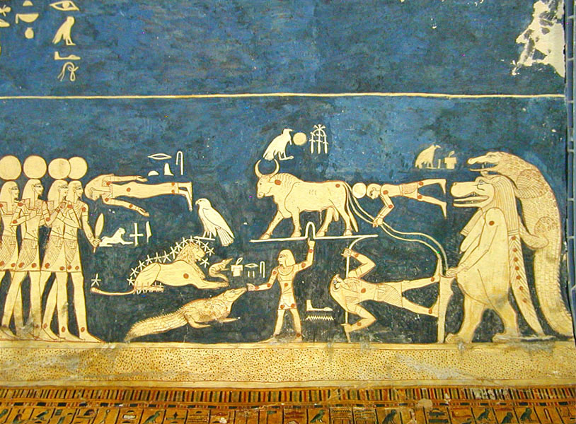 Détail du plafond astronomique de la Chambre funéraire. Séthi 1er est le 1er Roi important de l'époque Ramesside (1294-1279 av. J.C.). Il a fait construire de nombreux temples dont la grande salle hypostyle du temple d'Amon à Karnak ou le temple de millions d'années à Thèbes ouest. La tombe de Séthi 1er a été découverte par l'italien Belzoni en octobre 1817. Sa conception est totalement nouvelle. Une division est introduite entre les parties supérieures et inférieures et surtout la totalité de la tombe (100m de long) est décorée en relief peint.